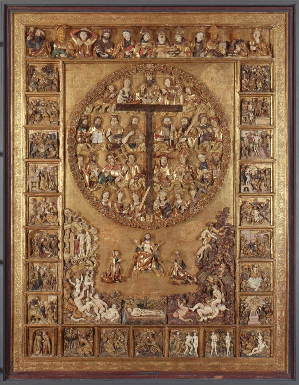 Werkstatt des Veit Stoß Datierung: um 1518 Ort: Nürnberg Material/Technik: Tafel: Tannenholz; Figuren: Lindenholz Maße: H. 233 cm, B. 173 cm, T. 13 cm Im Germanischen Nationalmuseum in Nürnberg (Sammlung: Skulptur bis 1800)